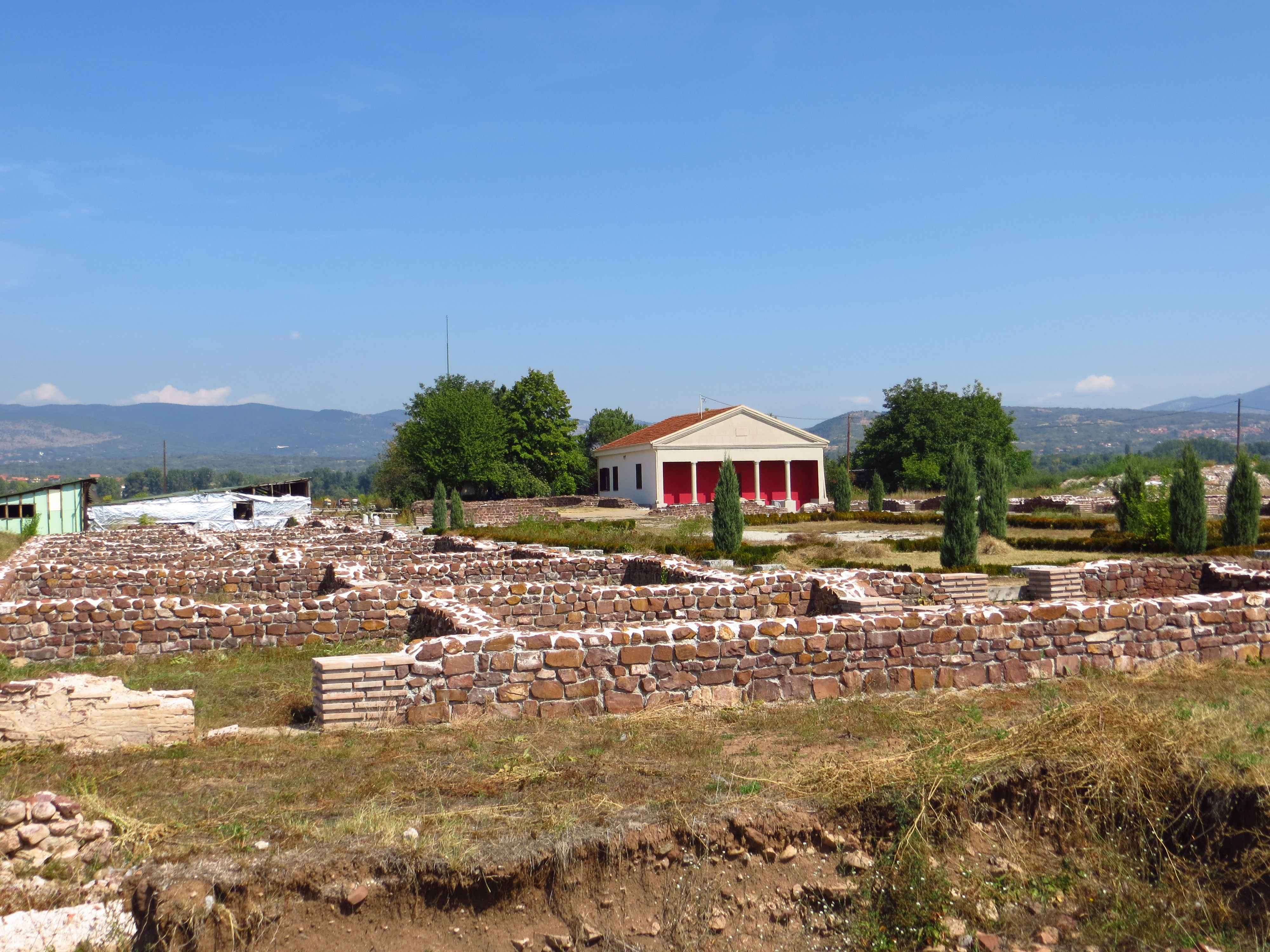 Medijana u Nišu